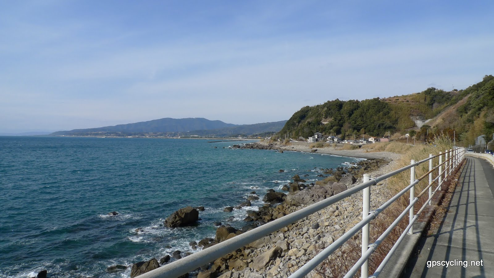 奈半利町甲